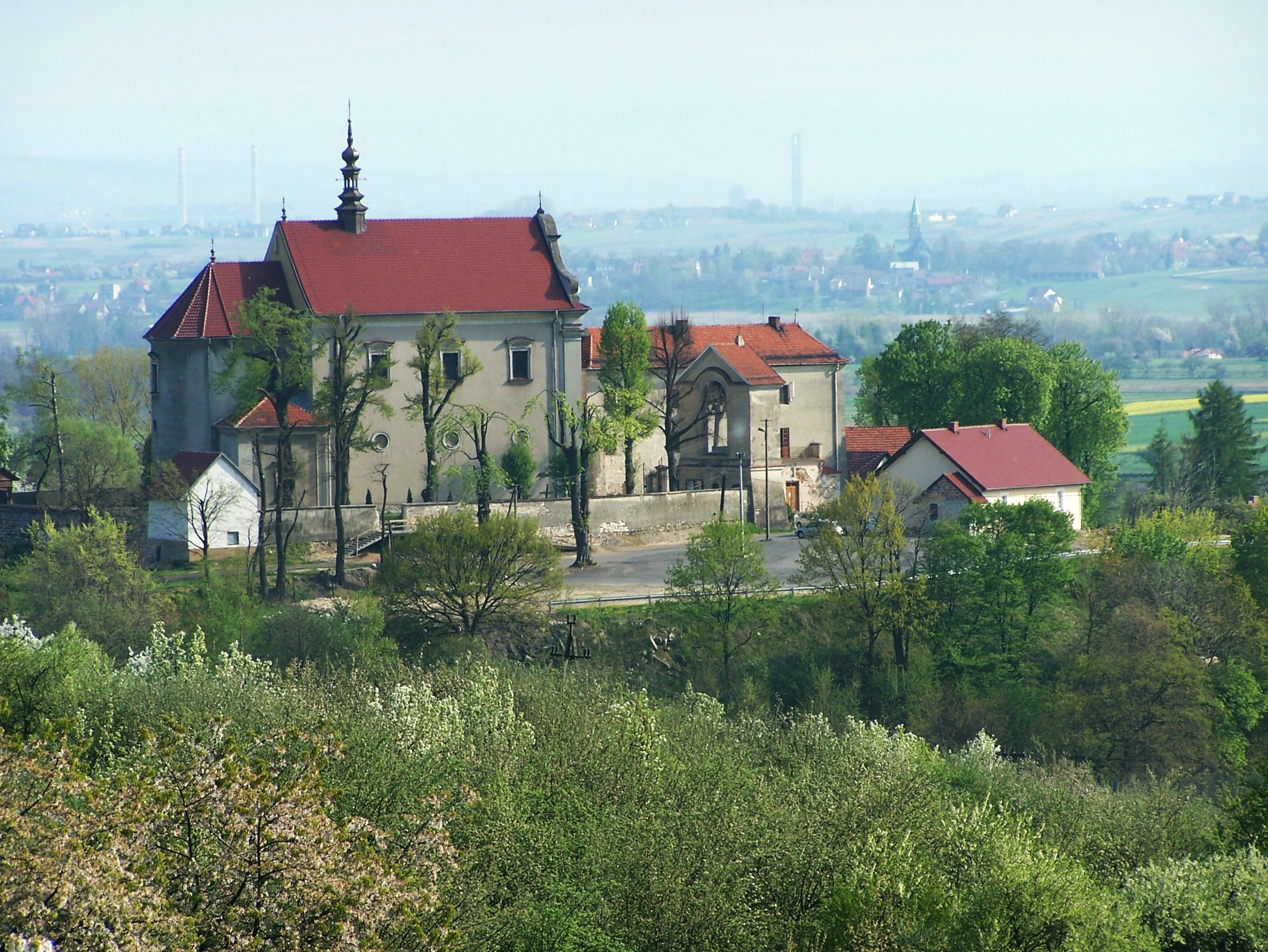 Morawica (województwo małopolskie)